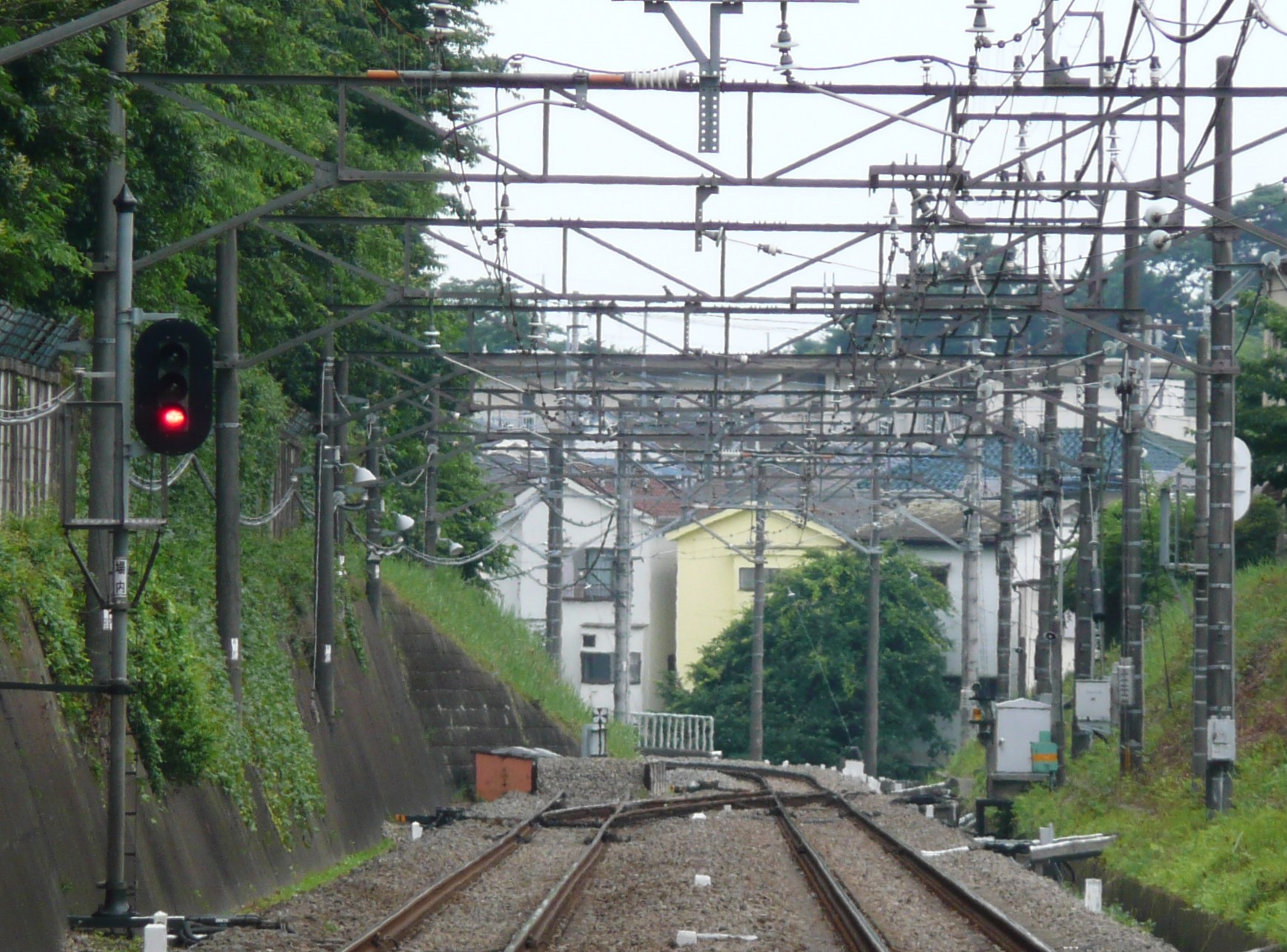 羽根沢信号所